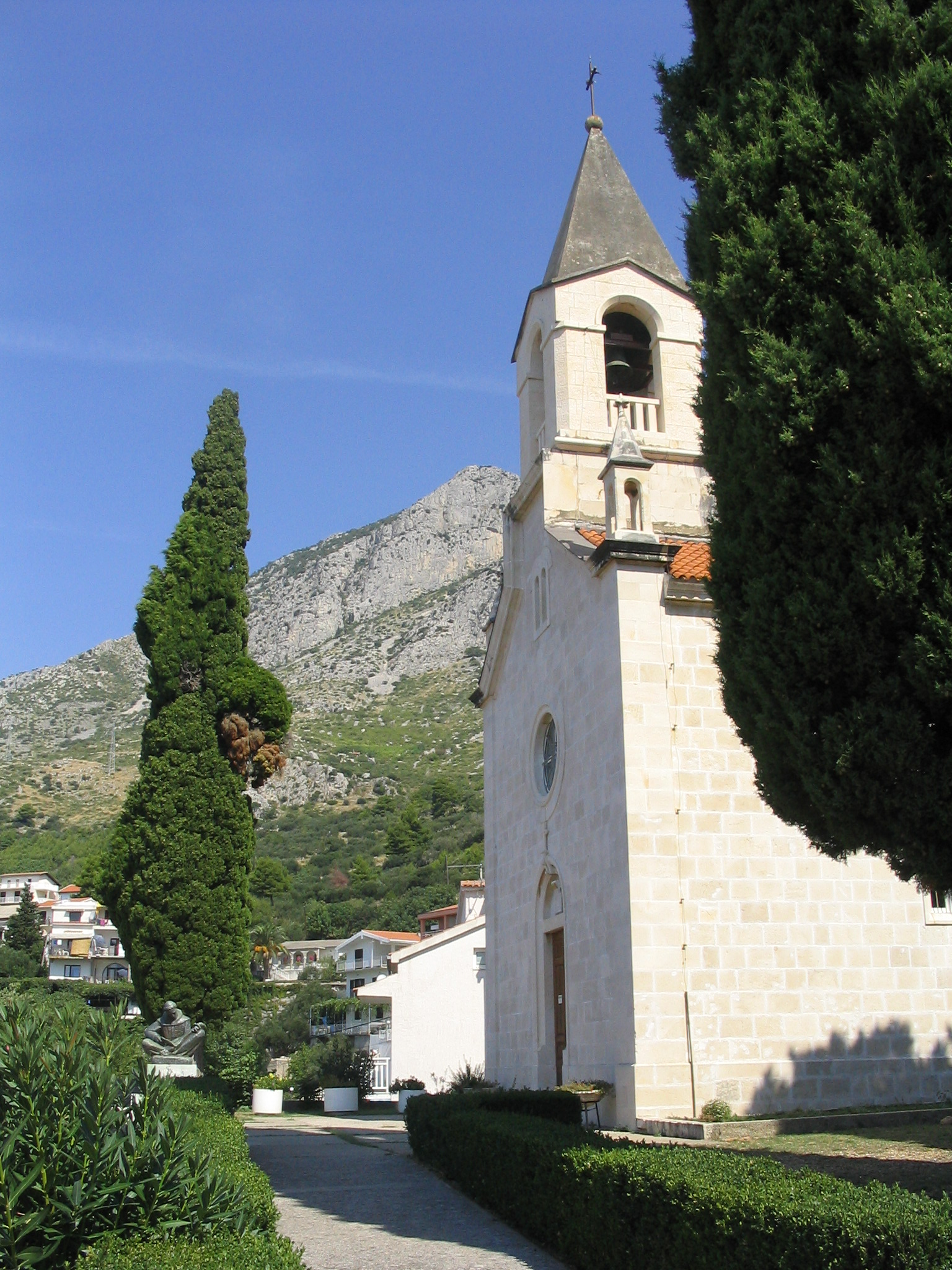 Kirche St. Margarete im Ortsteil Brist der Gemeinde Gradac, aufgenommen am 24.08.2006 von Dr. Hagen Graebner